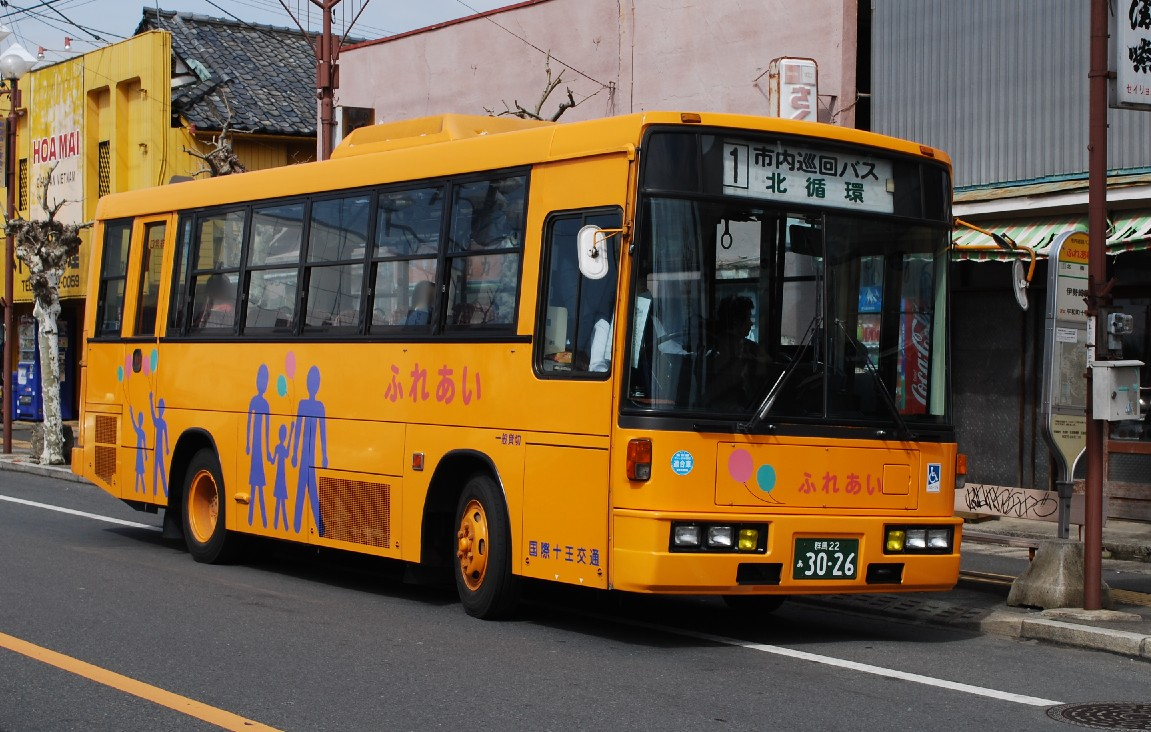 国際十王交通3026号車。伊勢崎市コミュニティーバス「ふれあい」用塗装車。伊勢崎駅そばの公道上より撮影。